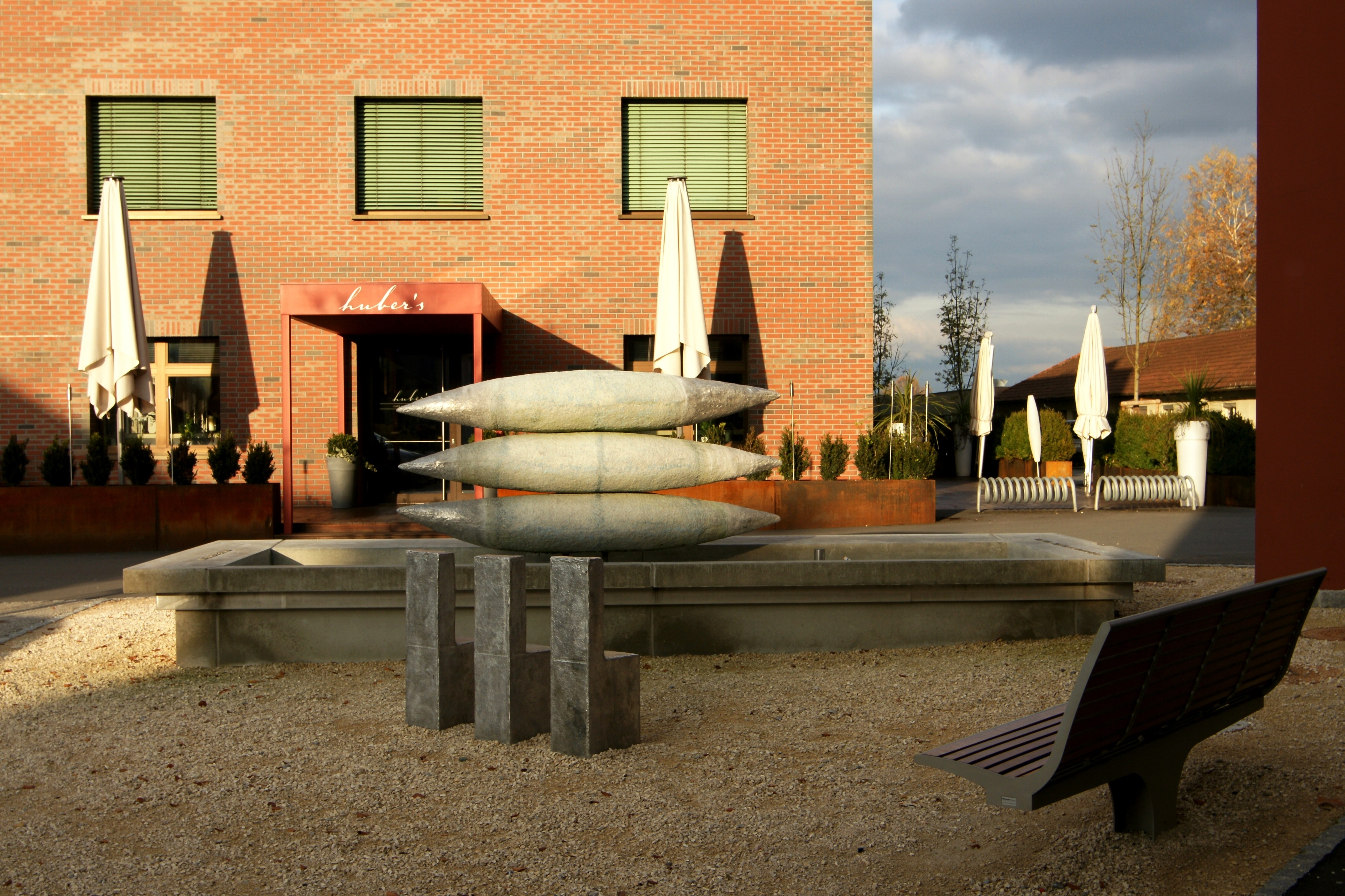 Am Garnmarkt Flagship Store von Huber Tricot im Zentrum von Götzis, Vorarlberg. Der Brunnen wurde gestaltet von Tone Fink.